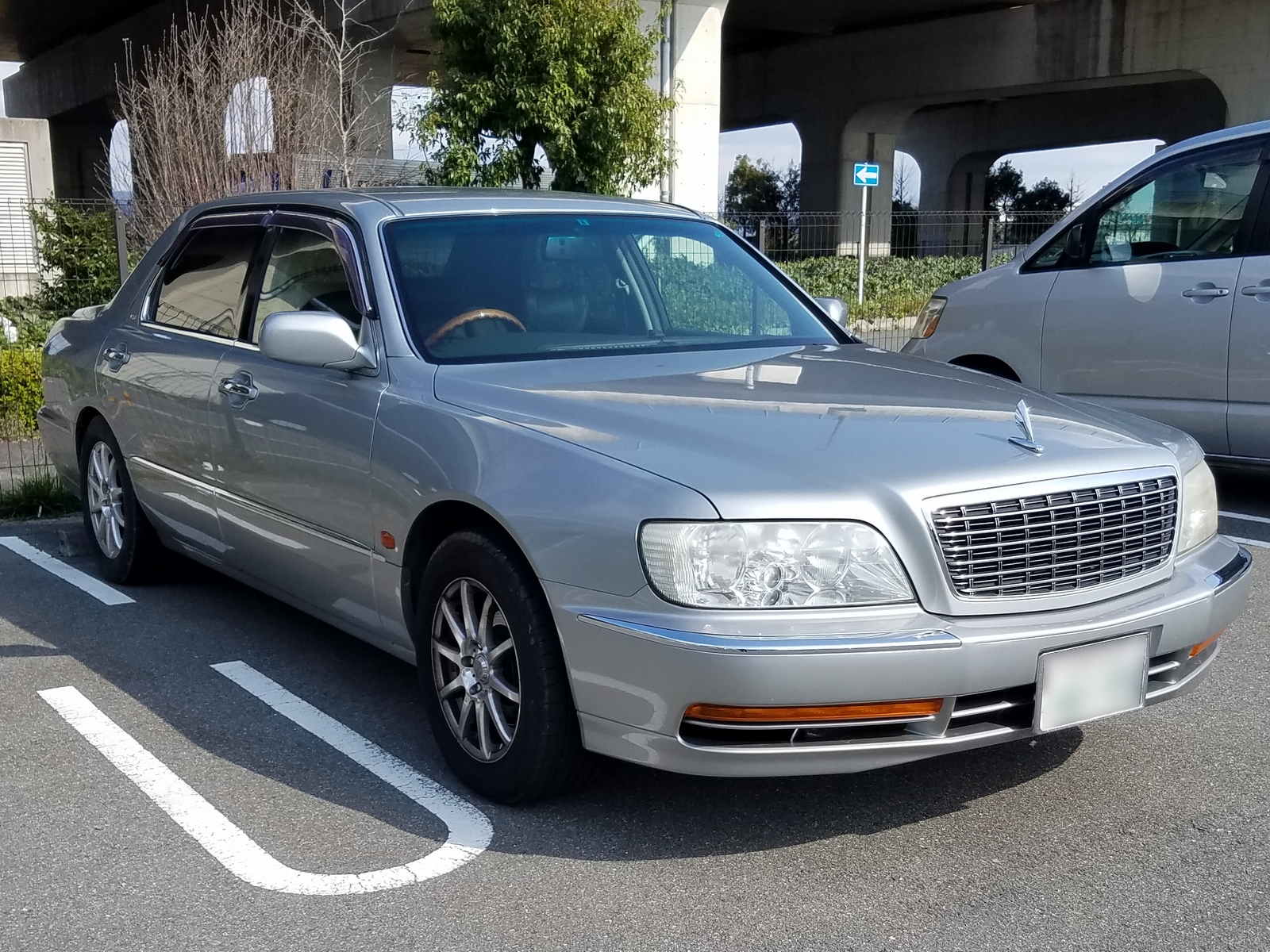 プラウディア C仕様